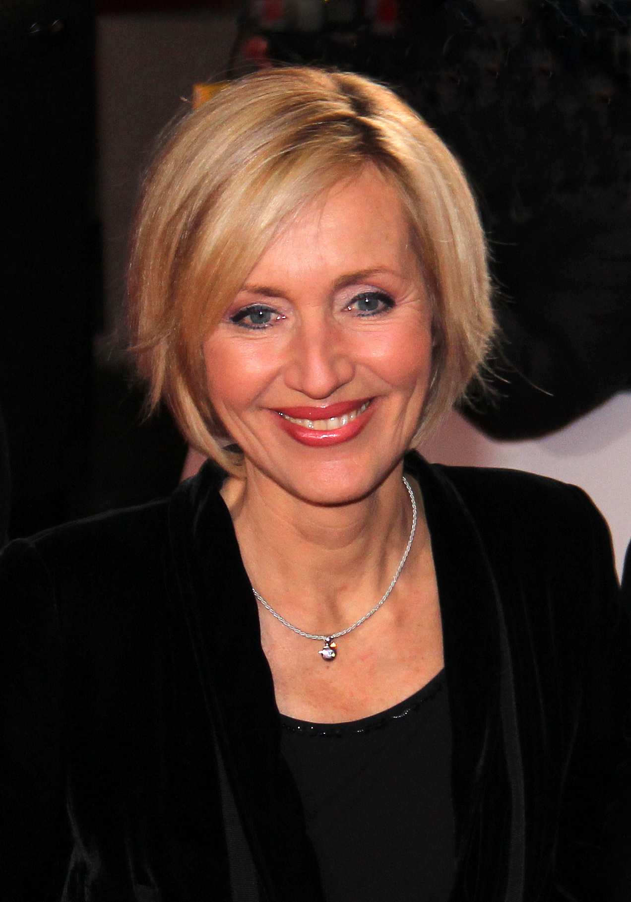 Petra Gerster bei der Goldenen Kamera 2012